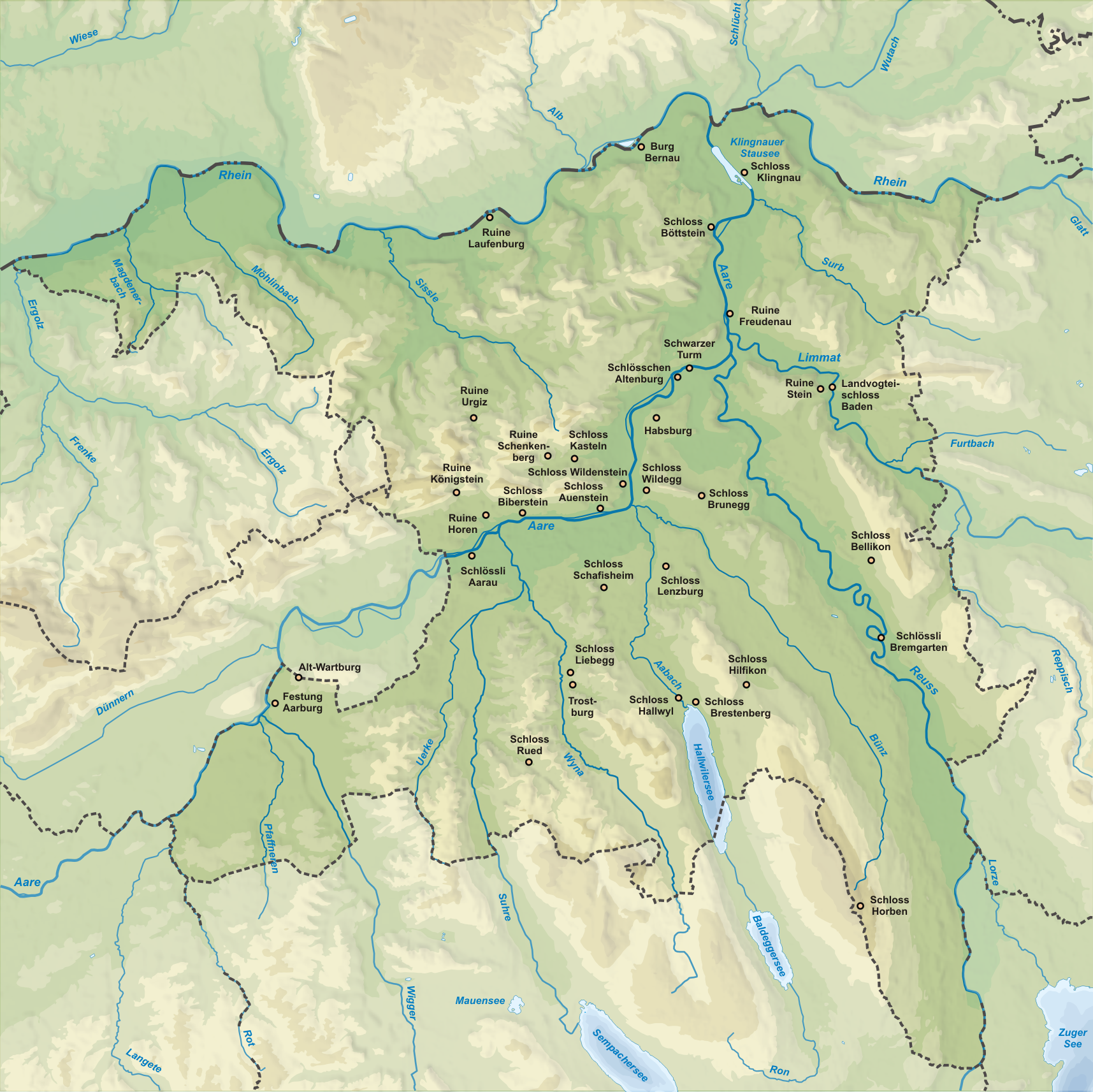 Karte der Burgen und Schlösser des Kanton Aargau. Topographischer Hintergrund: NASA Shuttle Radar Topography Mission (public domain). SRTM3 v.2.